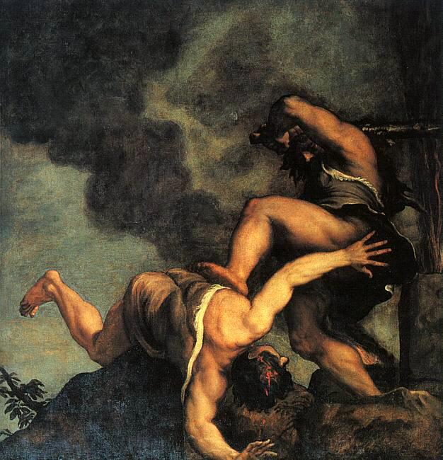 stellt mehr als bei meisten Altären, ausgenommen Pesaro-Altar, auf Betrachterstandpunkt ab, in dem es wie die anderen beiden Deckengemälde in Untersicht gemalt ist.